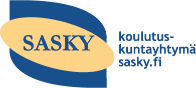 SASKY koulutuskuntayhtymän logo.